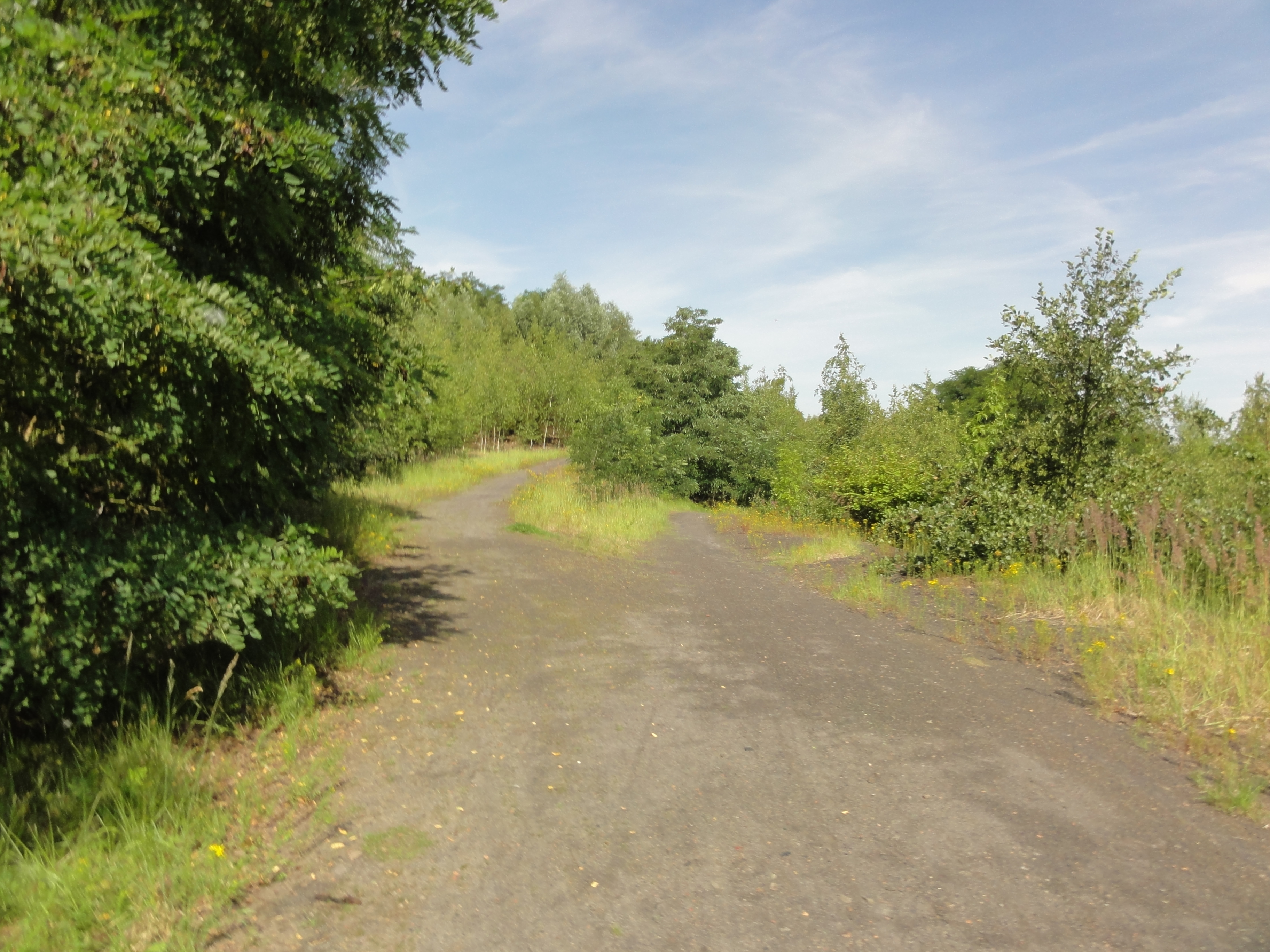 Terril n° 138 dit 9 de l'Escarpelle, Fosse n° 9 de la Compagnie des mines de l'Escarpelle, Roost-Warendin, Nord, Nord-Pas-de-Calais, France.